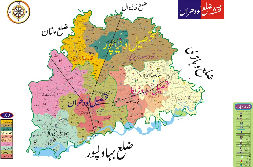 پنجابی: ضلع لودھراں دے پنڈاں دا نقشہ